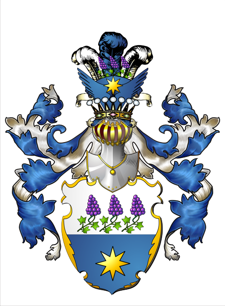 herb Biszping, wersja w. Bonieckiego